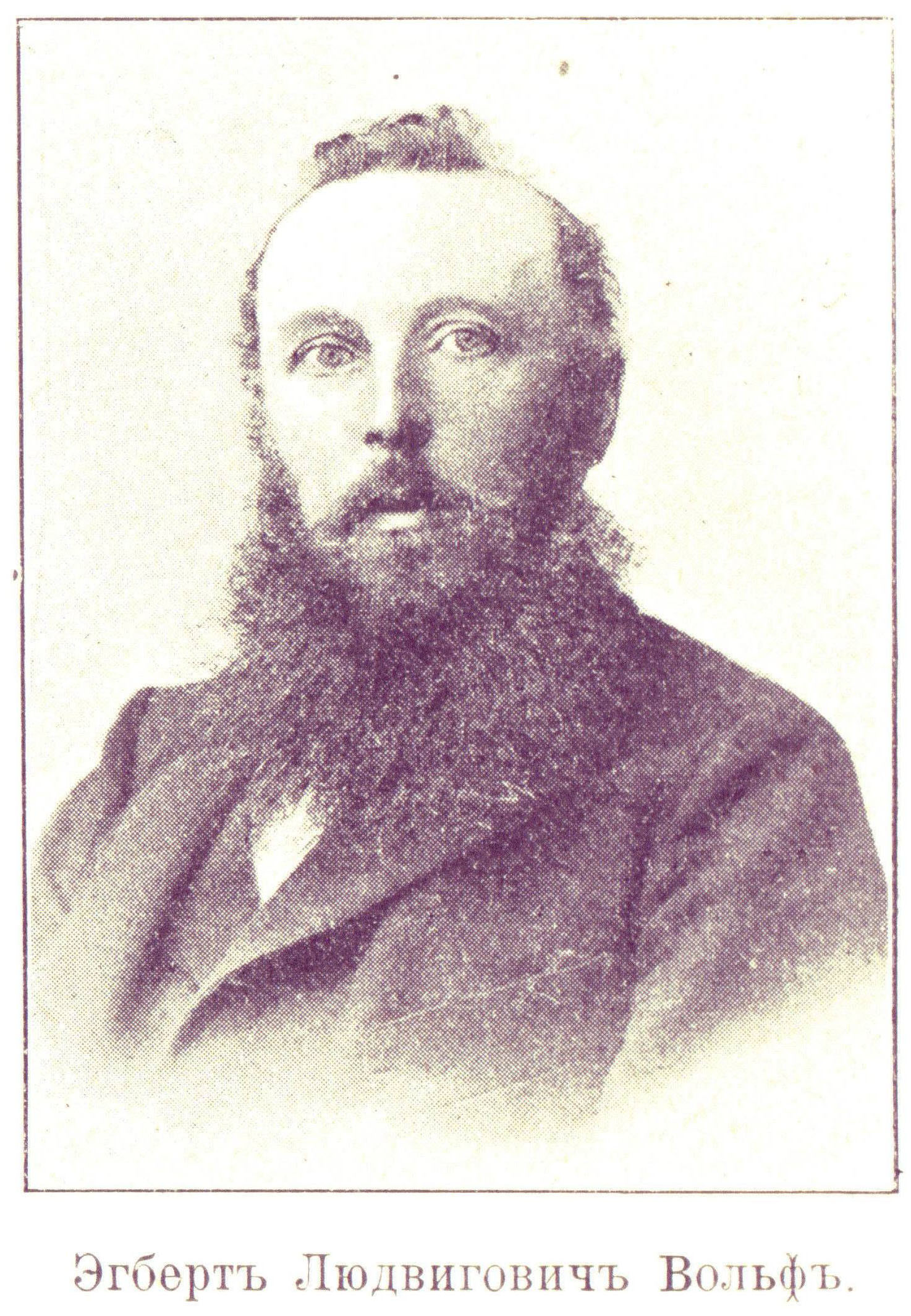 Эгберт Людвигович Вольф - российский ботаник, дендролог, систематик